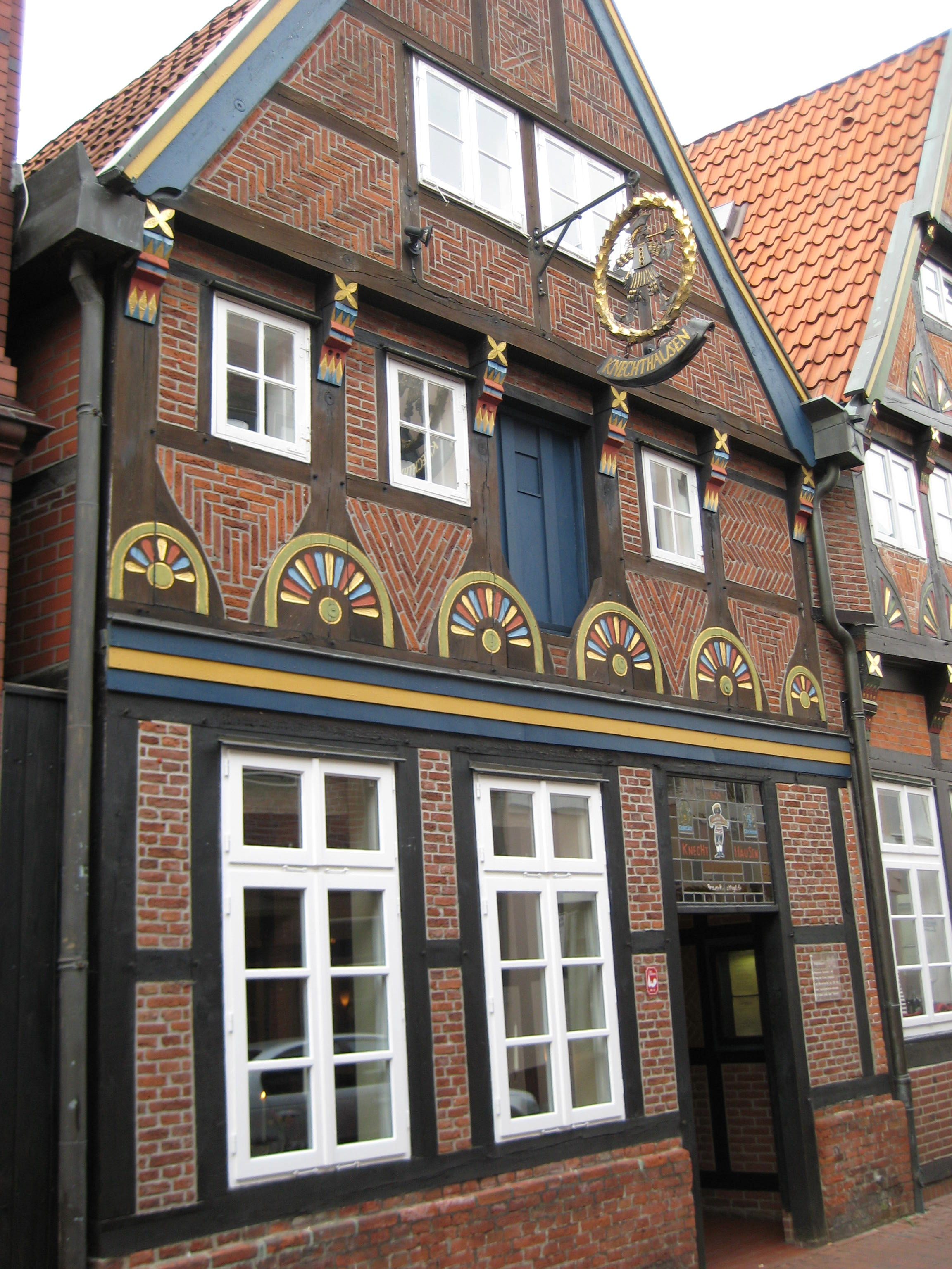 Stade Knechthausen; seit Ende des 15. Jahrhunderts Gildehaus der Brauerknechte